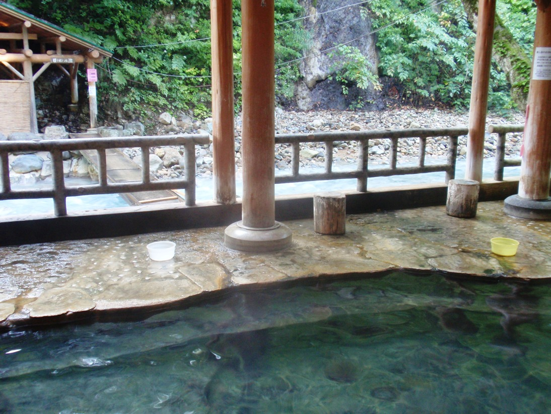 夏油温泉、真湯と川向うの目の湯